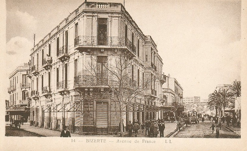 Avenue de France in Bizerte, Tunisia